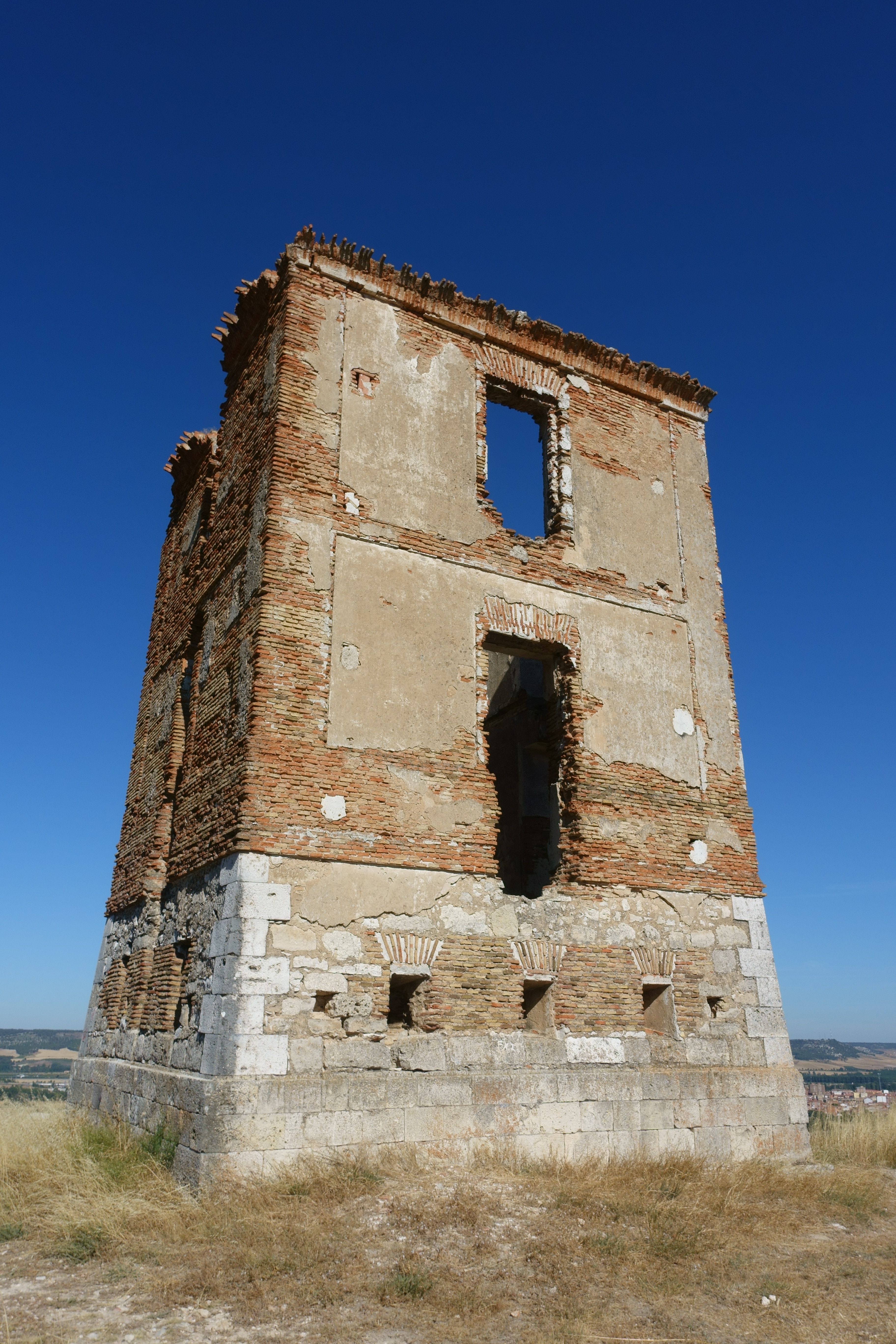 Torre óptica en Tariego de Cerrato (Palencia, España).